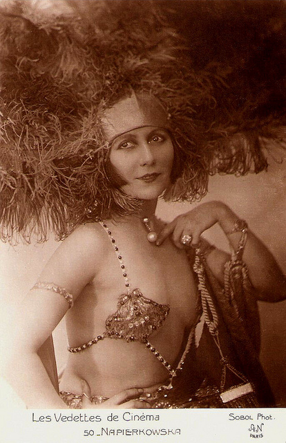 French postcard of Stacia Napierkowska (1886-1945)